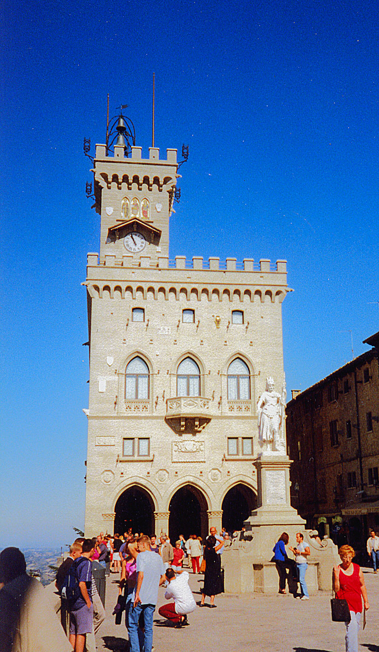 Regierungspalast San Marinos